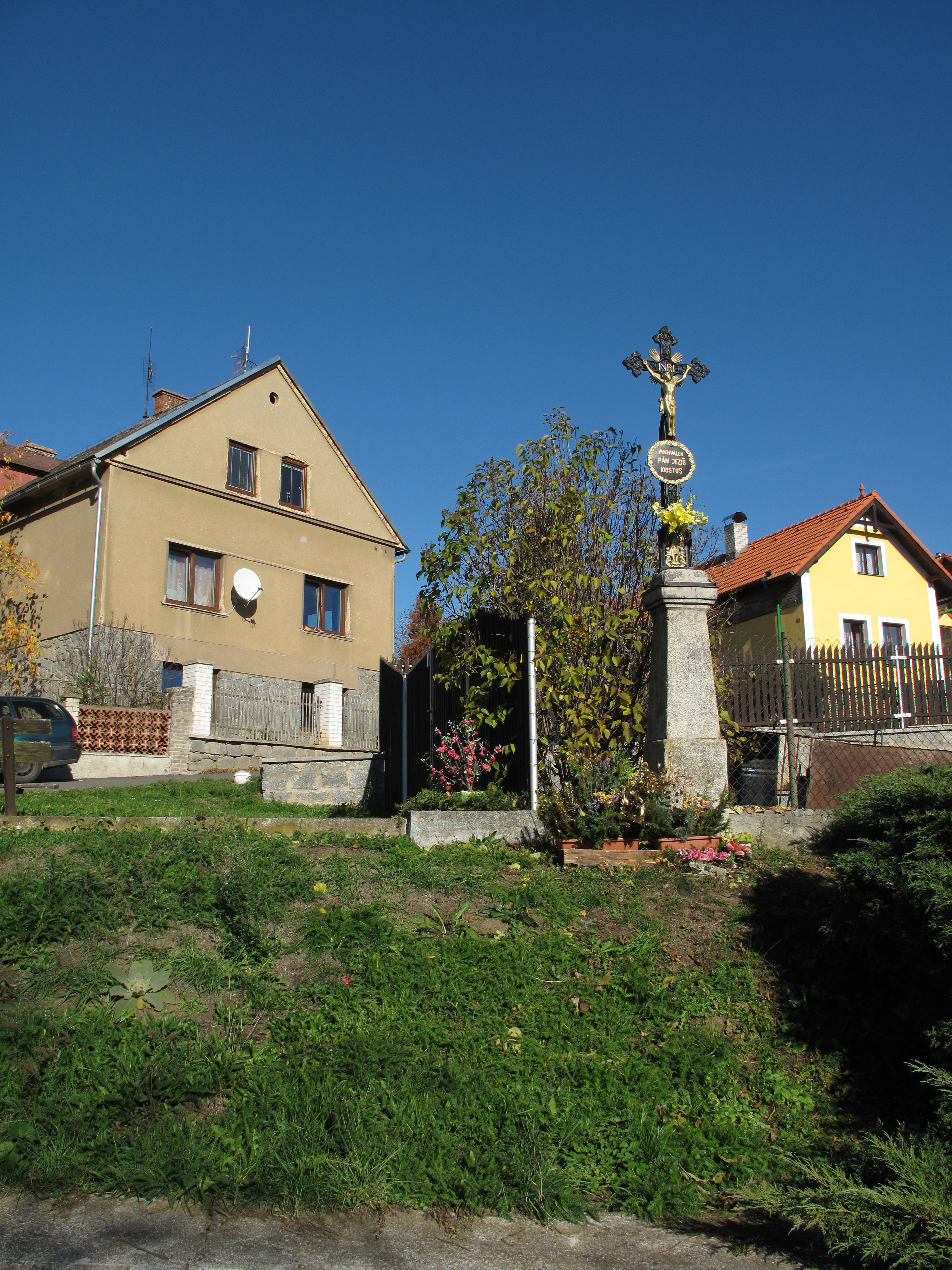 Křížek v Oslí. Okres Příbram, Česká republika.